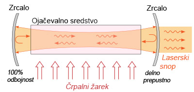 Uporaba zrcal v laserjih. Prirejeno po